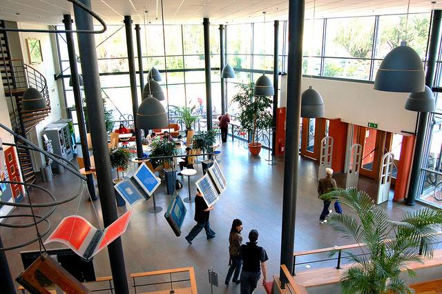 Kalmar UB